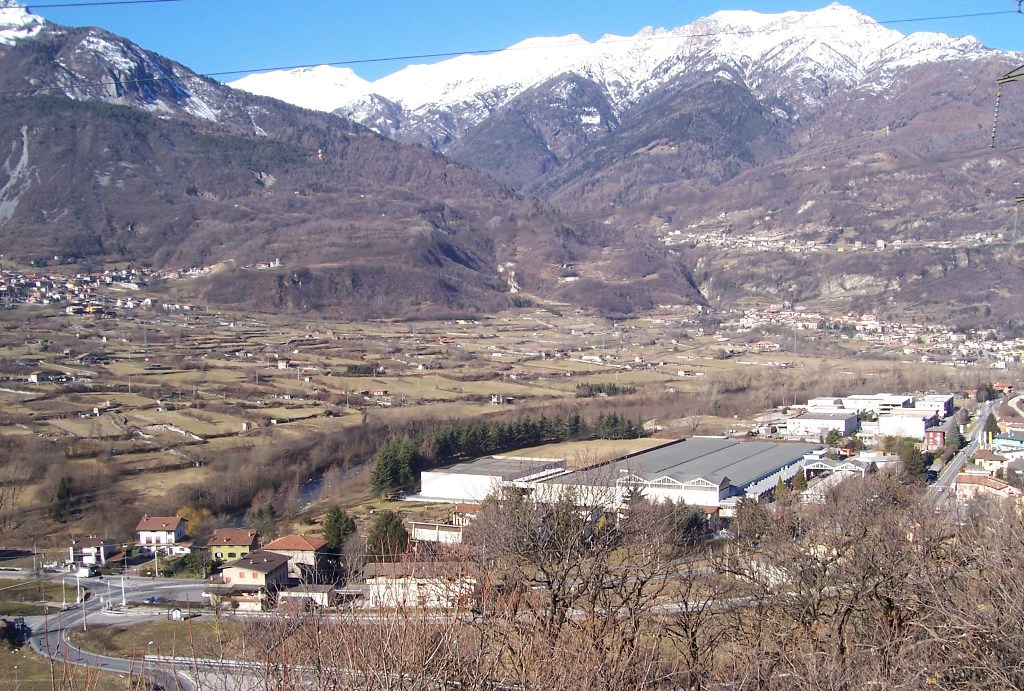 Località Giarelli e Campagnelli. Nadro, Val Camonica